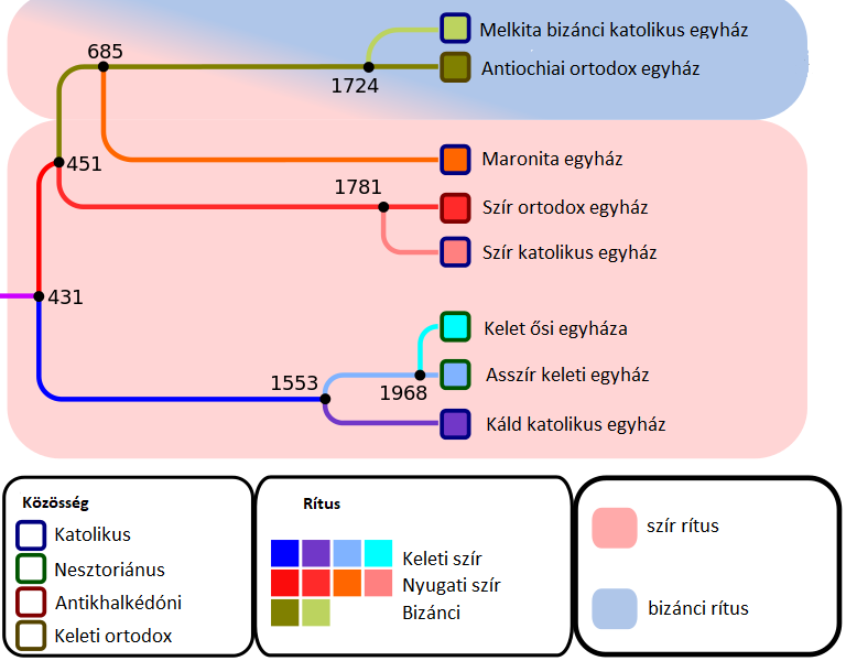 A szír kereszténység ágai